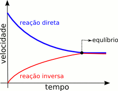 Gráfico da velocidade das reações diretas e inversas de um equilíbrio químico (desenhado por mim)